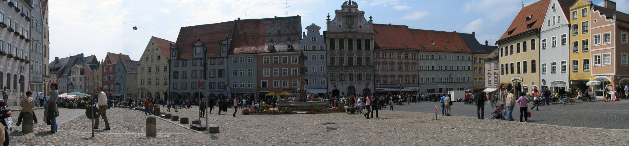 Beschreibung: Landsberg am Lech Hauptplatz Quelle: selbst fotografiert Datum: 12. Juni 2005 Fotograf / Zeichner: Patrick Huebgen Kategorie:Bild:Panorama Kategorie:Landsberg am Lech